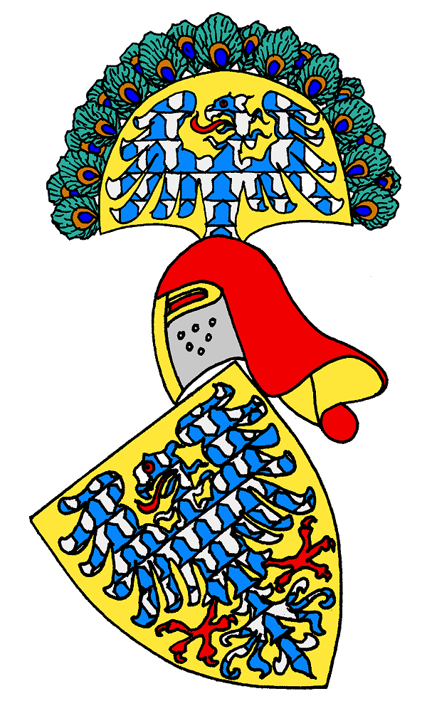 Stammwappen derer von Frohburg